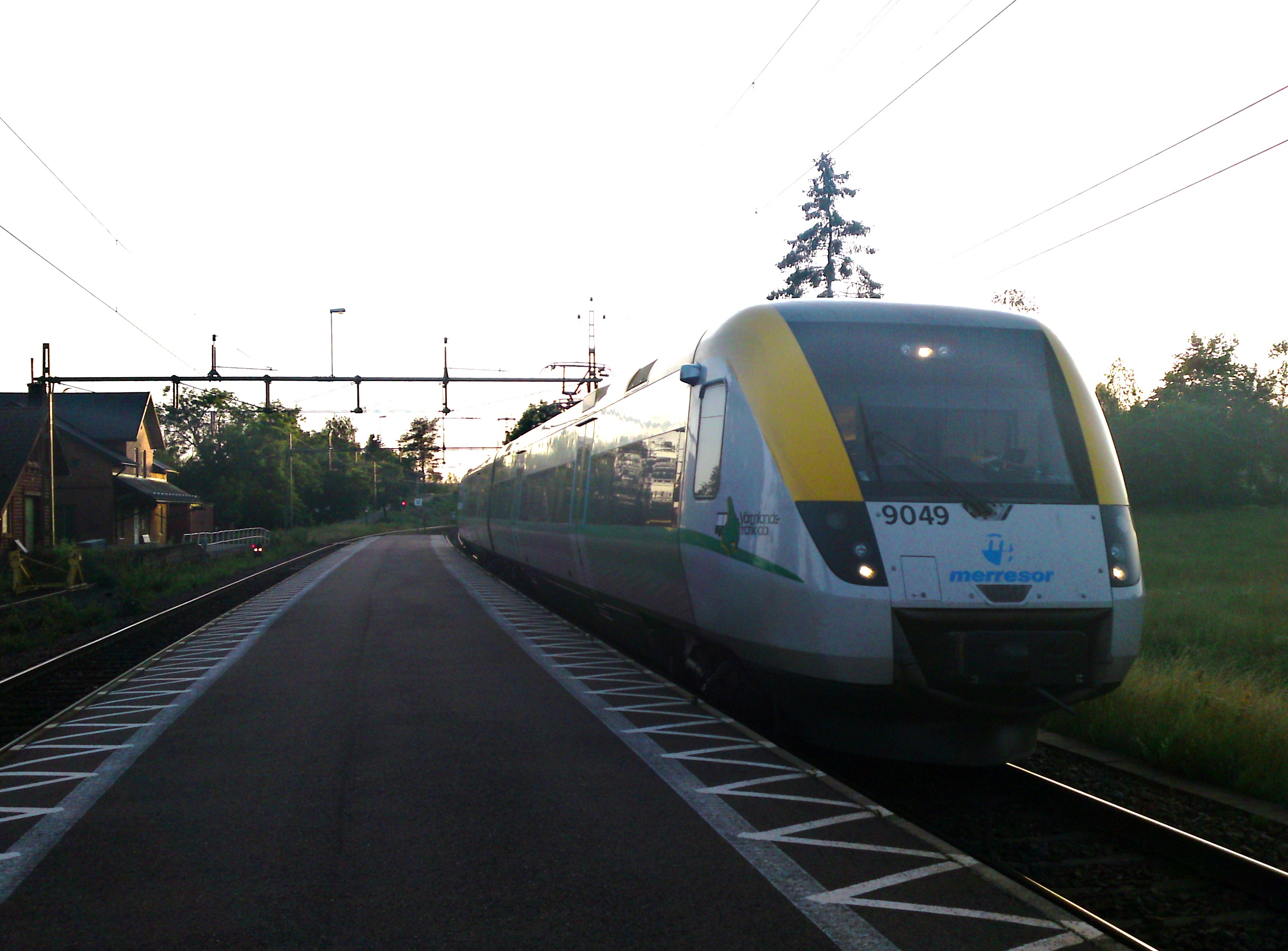 Ett Regina (Tåg) på Högboda Järnvägsstation